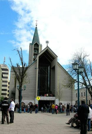 Frontis - Catedral de Valdivia